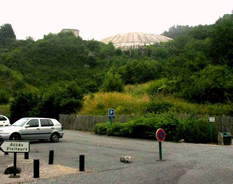 . Site dit de la coupole d'Helfaut (en réalité sur la commune de Wizernes), dans le pas de calais. Ouvrage construit par l'armée nazie pour y construire des missiles V1, fortement bombardé à la fin de la seconde guerre mondiale. La coupole abrite un musée construit à la fin des années 1990, sur le thème de la seconde guerre mondiale et de la conquête spatiale.